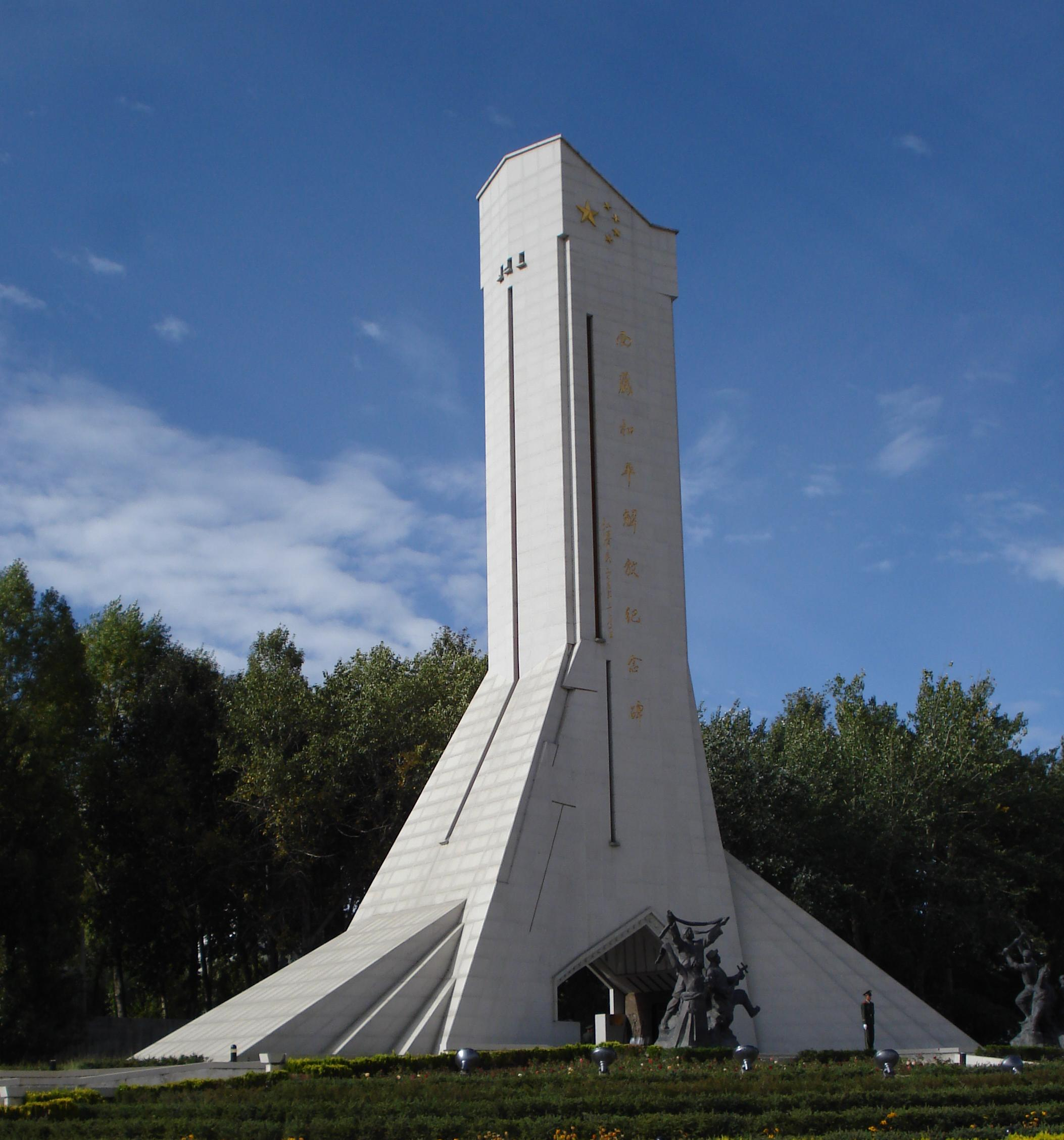 Tibet, Lhasa, Potala square. Liberation monument.